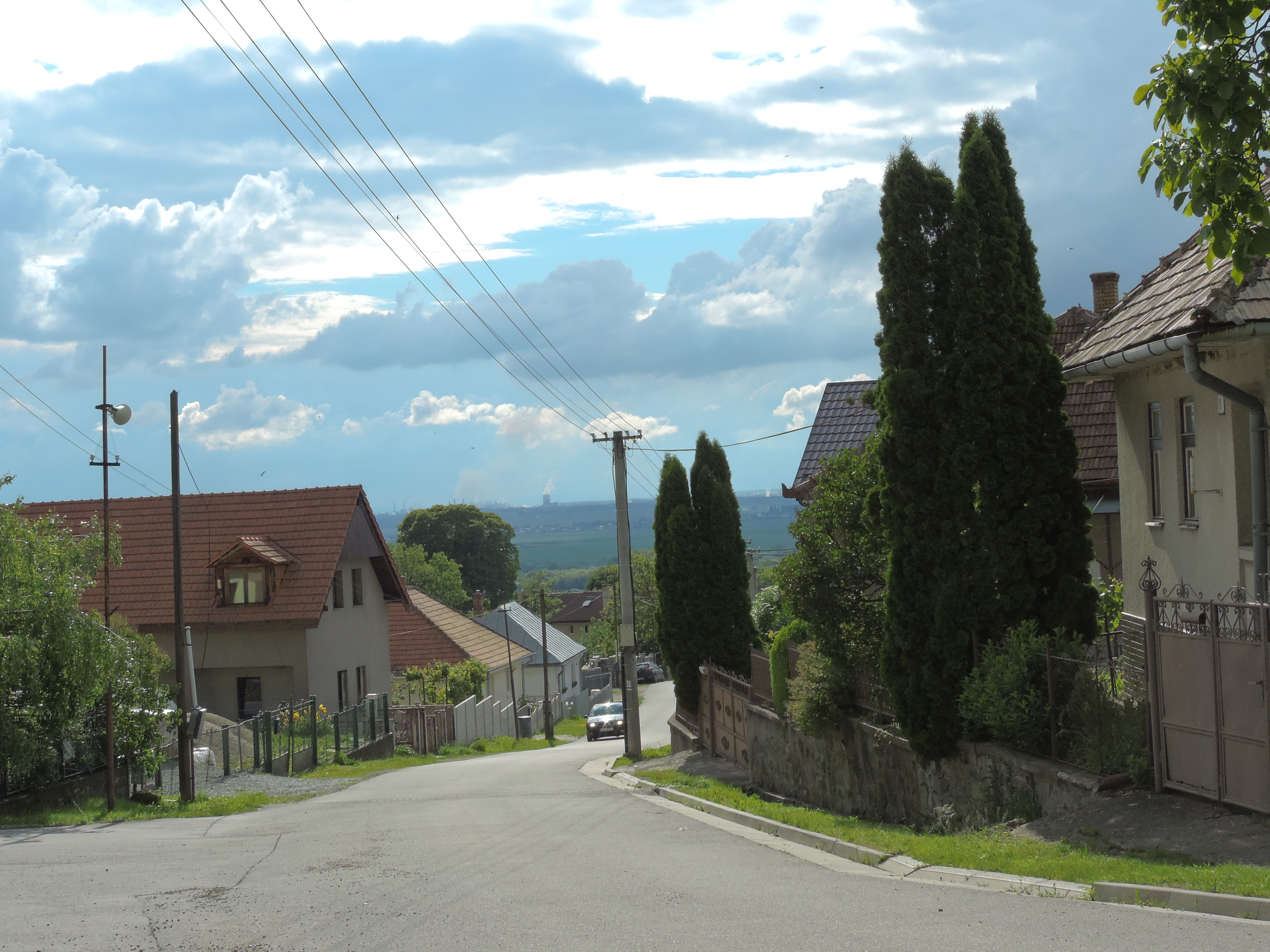 Na hornom konci